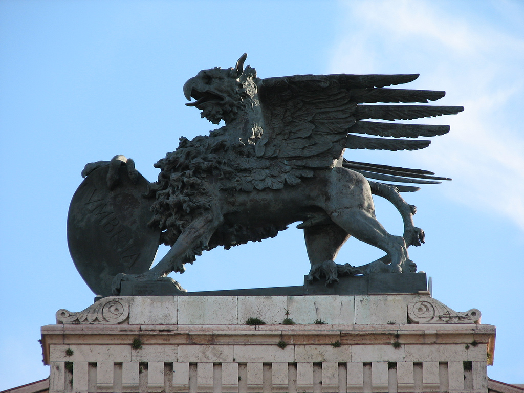 Il grifone di Perugia